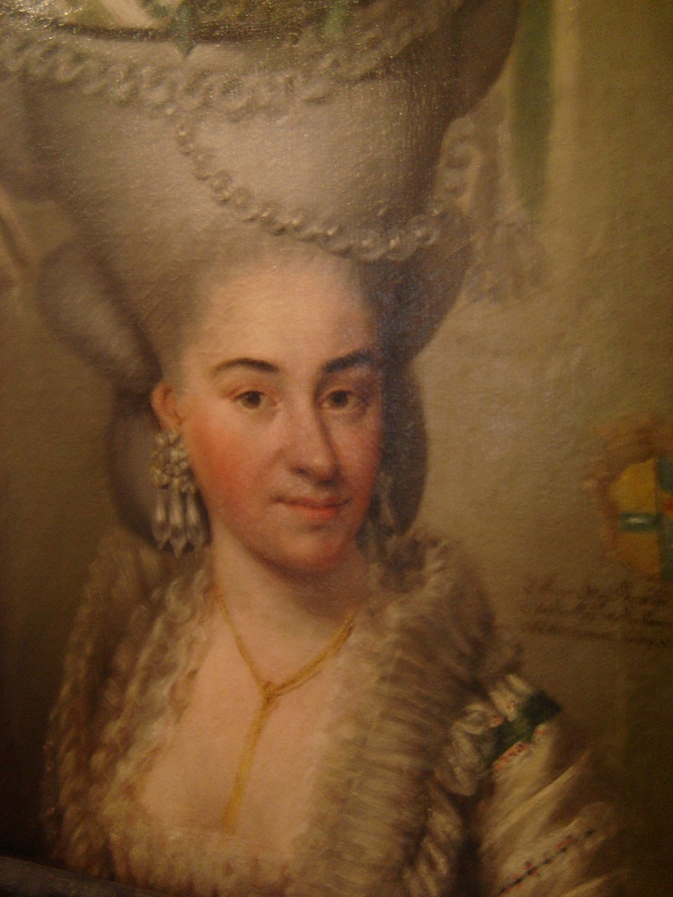 old ragusan paint